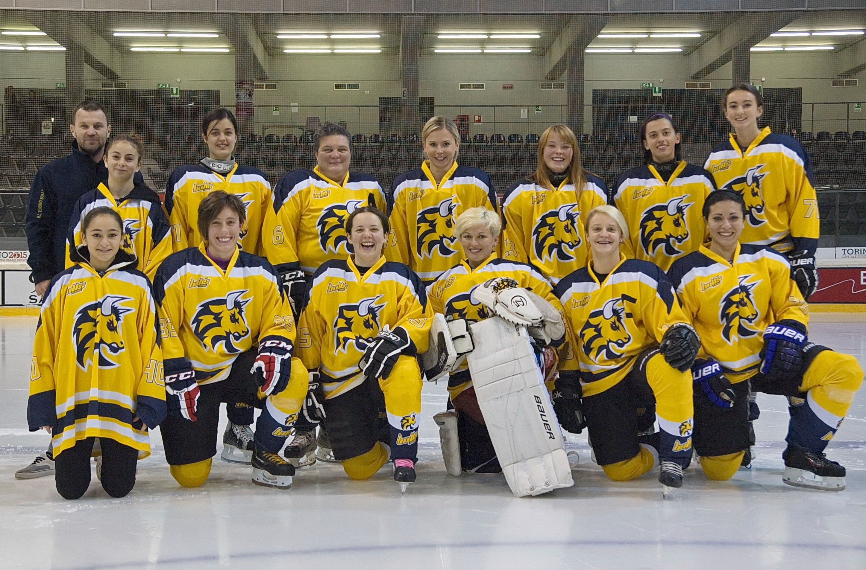 incontro tra Torino Bulls e EV Bozen' Eagles valevole per il campionato di serie A femminile del 8 novembre 2014